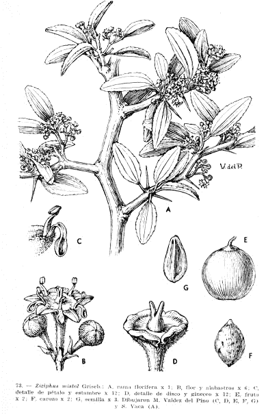 Ziziphus mistol illustrated details